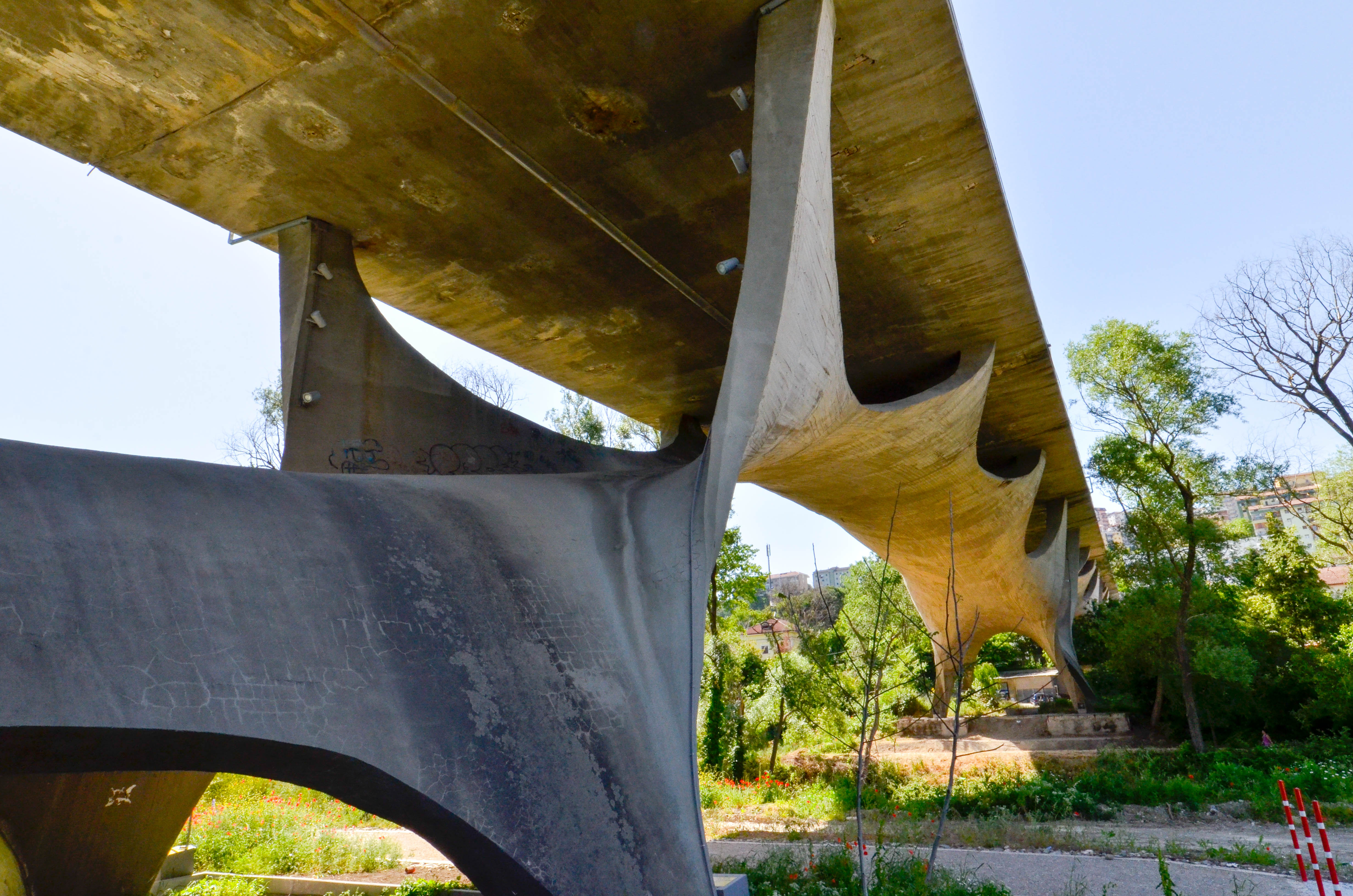 ponte sul Basento This is a photo of a monument which is part of cultural heritage of Italy.